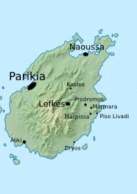 Villes et villages principaux de Paros / Principal towns and villages of Paros